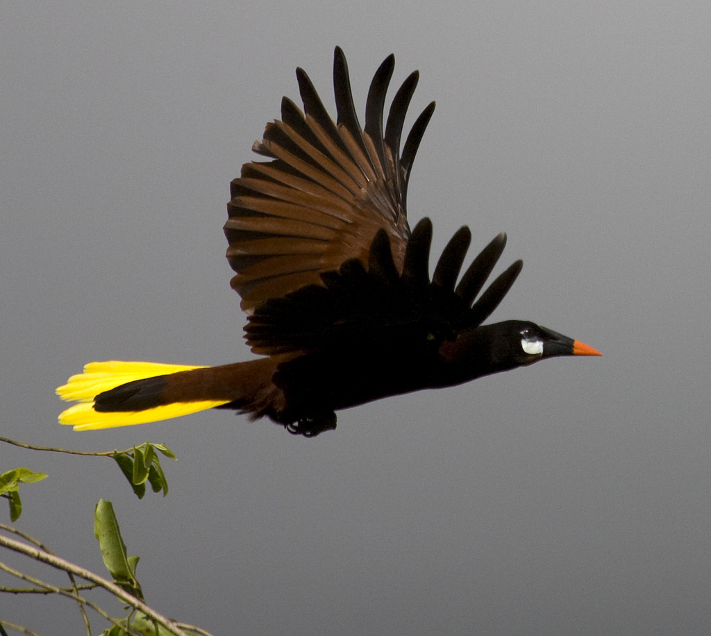 Psarocolius montezuma, Arenal Observation Lodge, Costa Rica